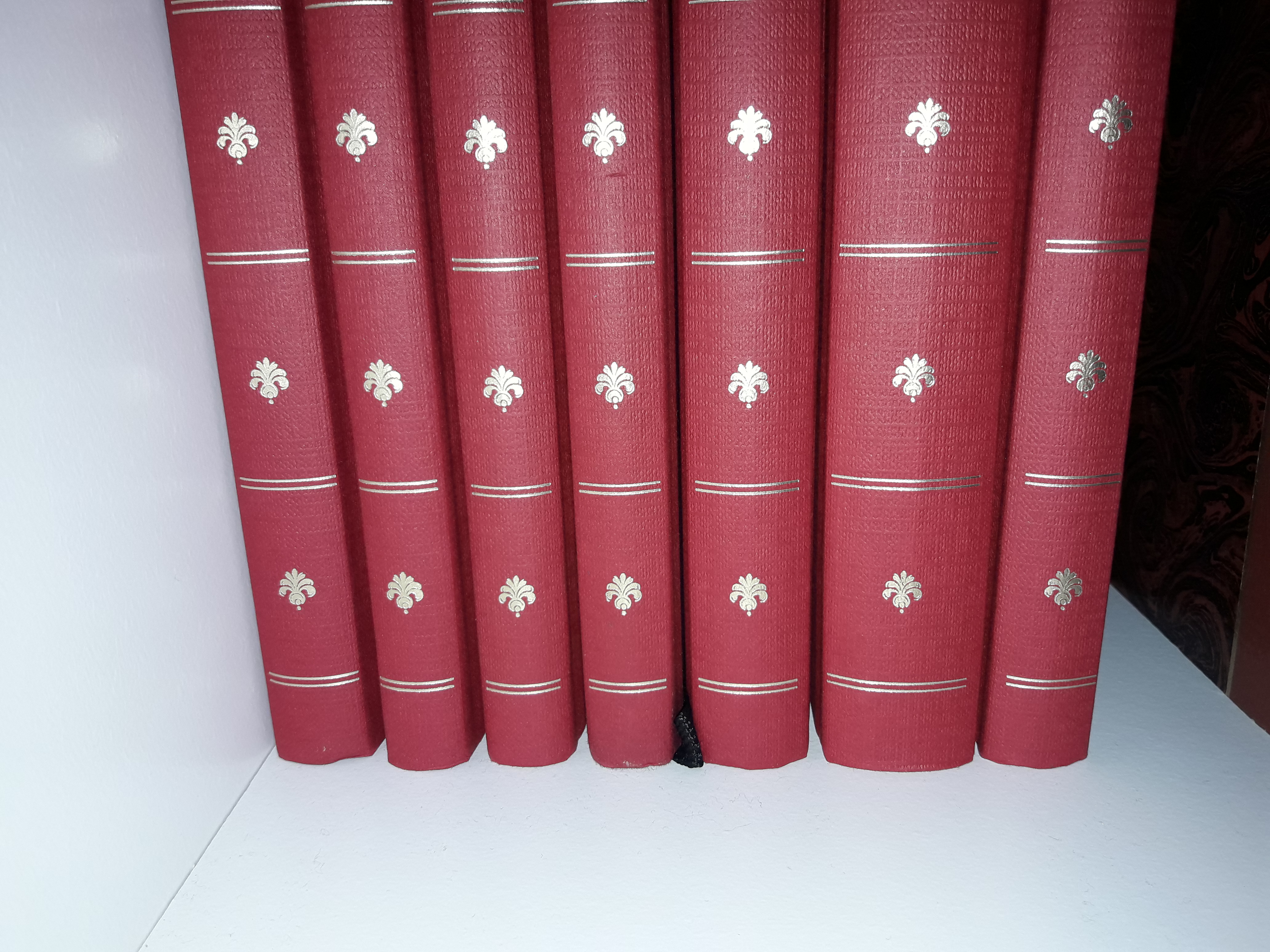 Cette photo représente une rangée de livres.